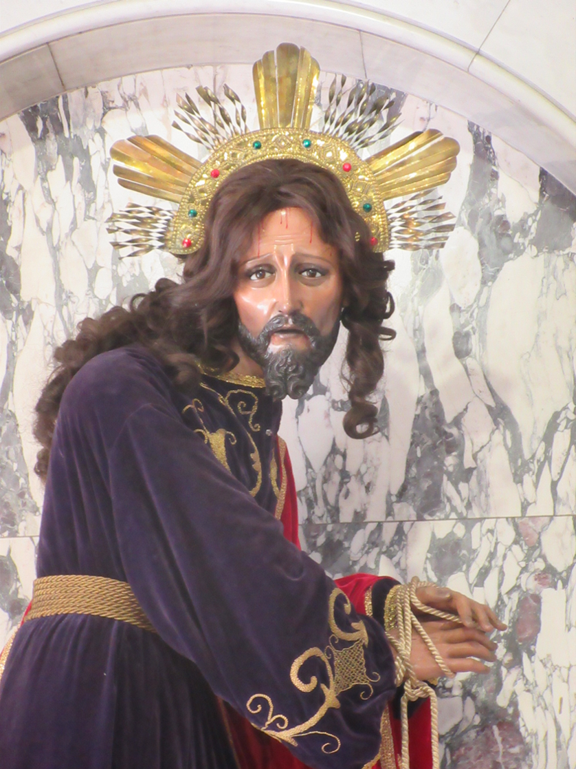 Imagen de Jesús Nazareno de la iglesia de Nuestra Señora de los Dolores, San José Costa Rica.